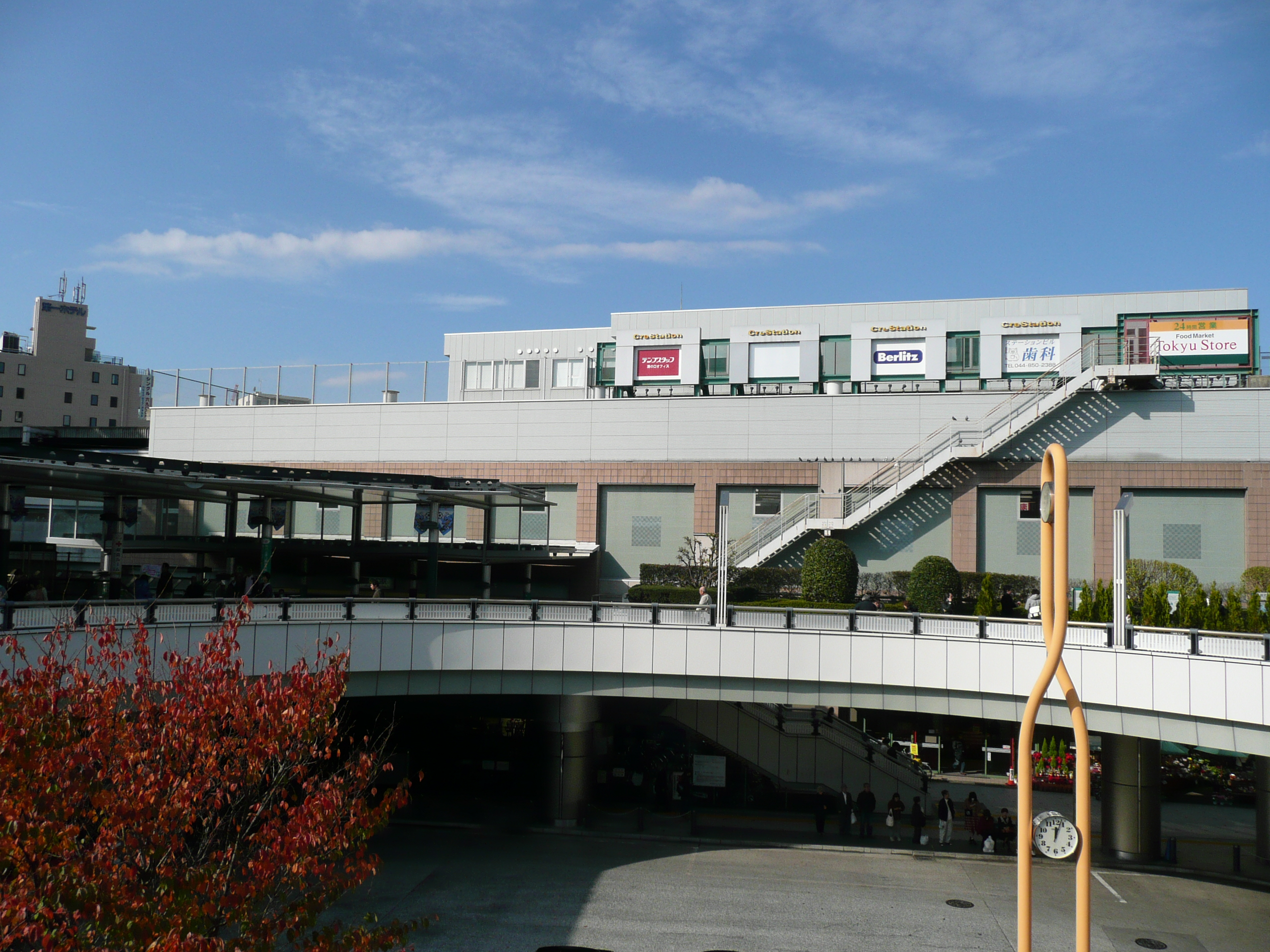 溝の口駅北口